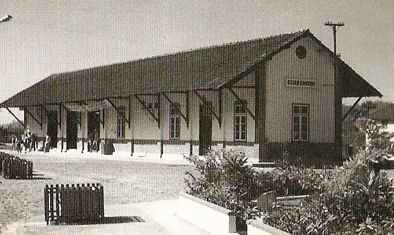 Estação Rodoferroviária, construção mais antiga da cidade, data de 1910